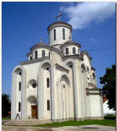 Serbian Orthodox church in Žitkovac, Serbia/L'église orthodoxe serbe des Saints-Archanges à Žitkovac, Serbie